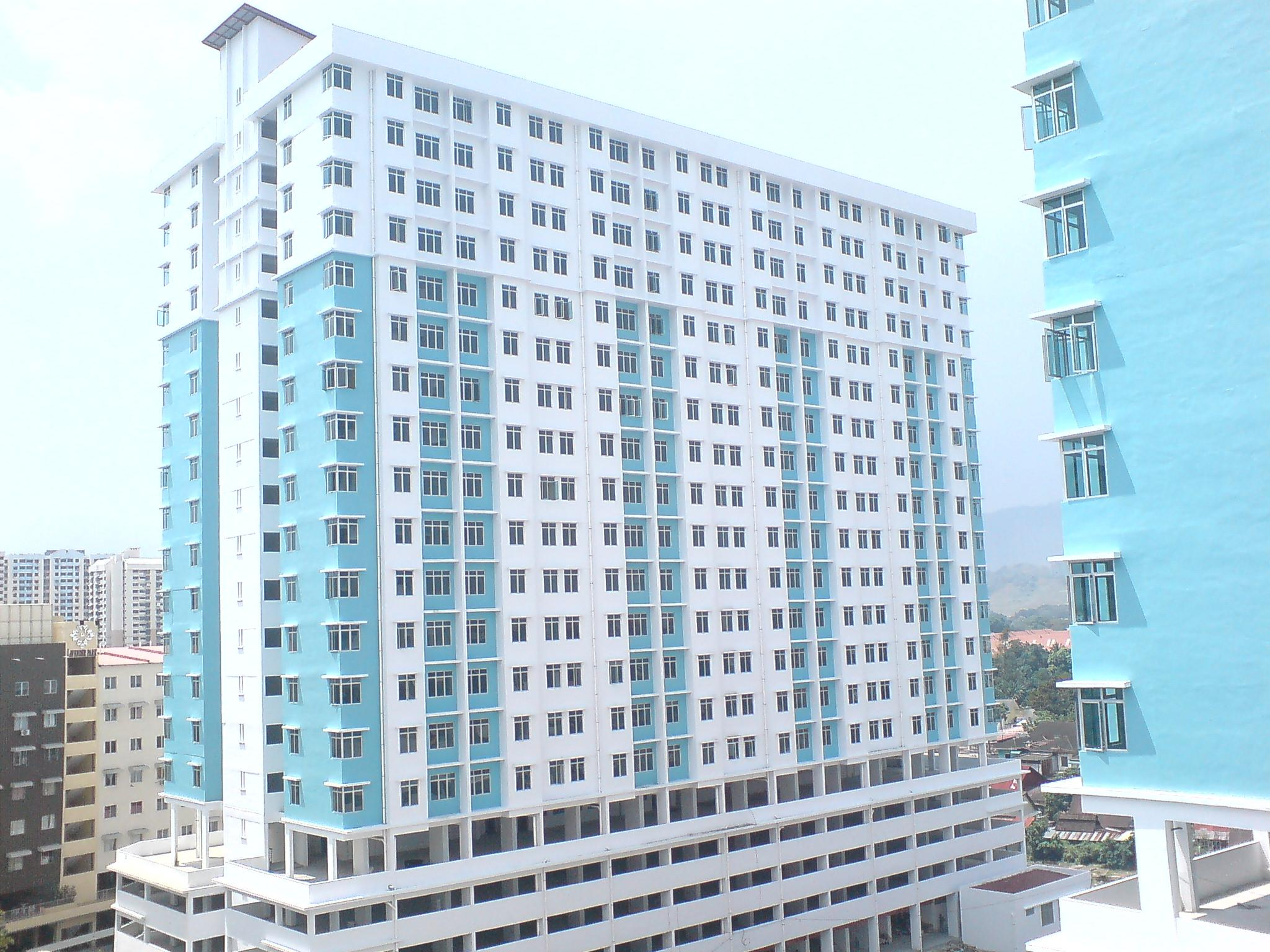 Pelangi Indah 3